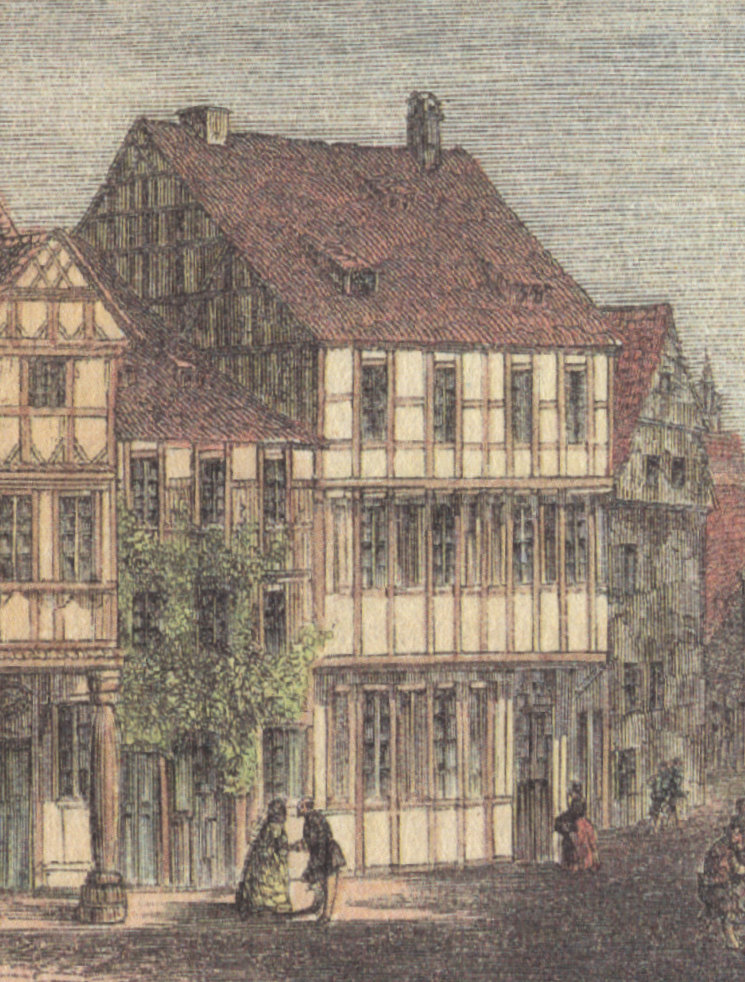 Häuser Schloßberg 13 und 14 in Quedlinburg, Ausschnitt aus kolorierte Zeichnung um 1840